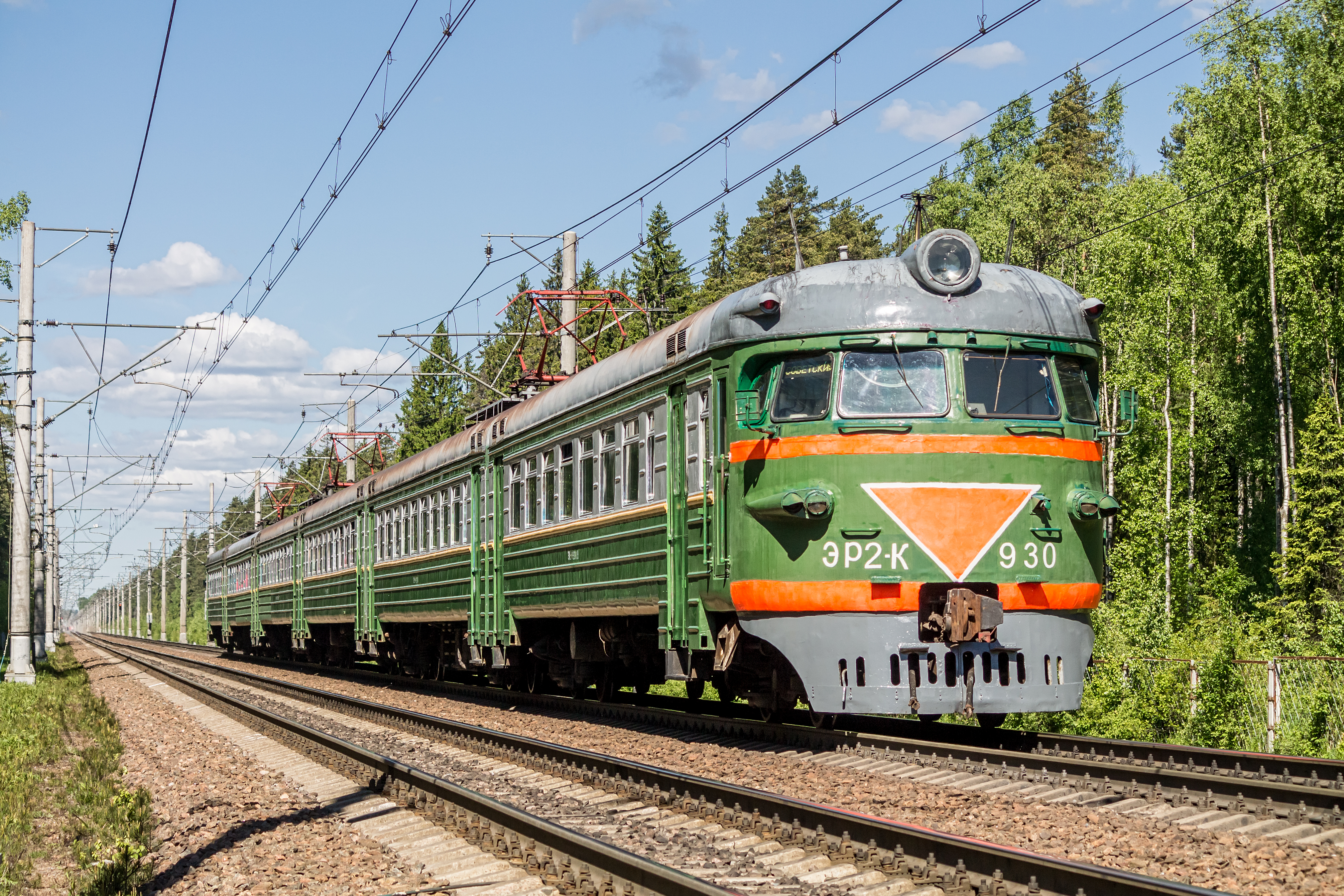 ЭР2К-930, перегон Белоостров - Зеленогорск см. фото 694228 в альбоме автора